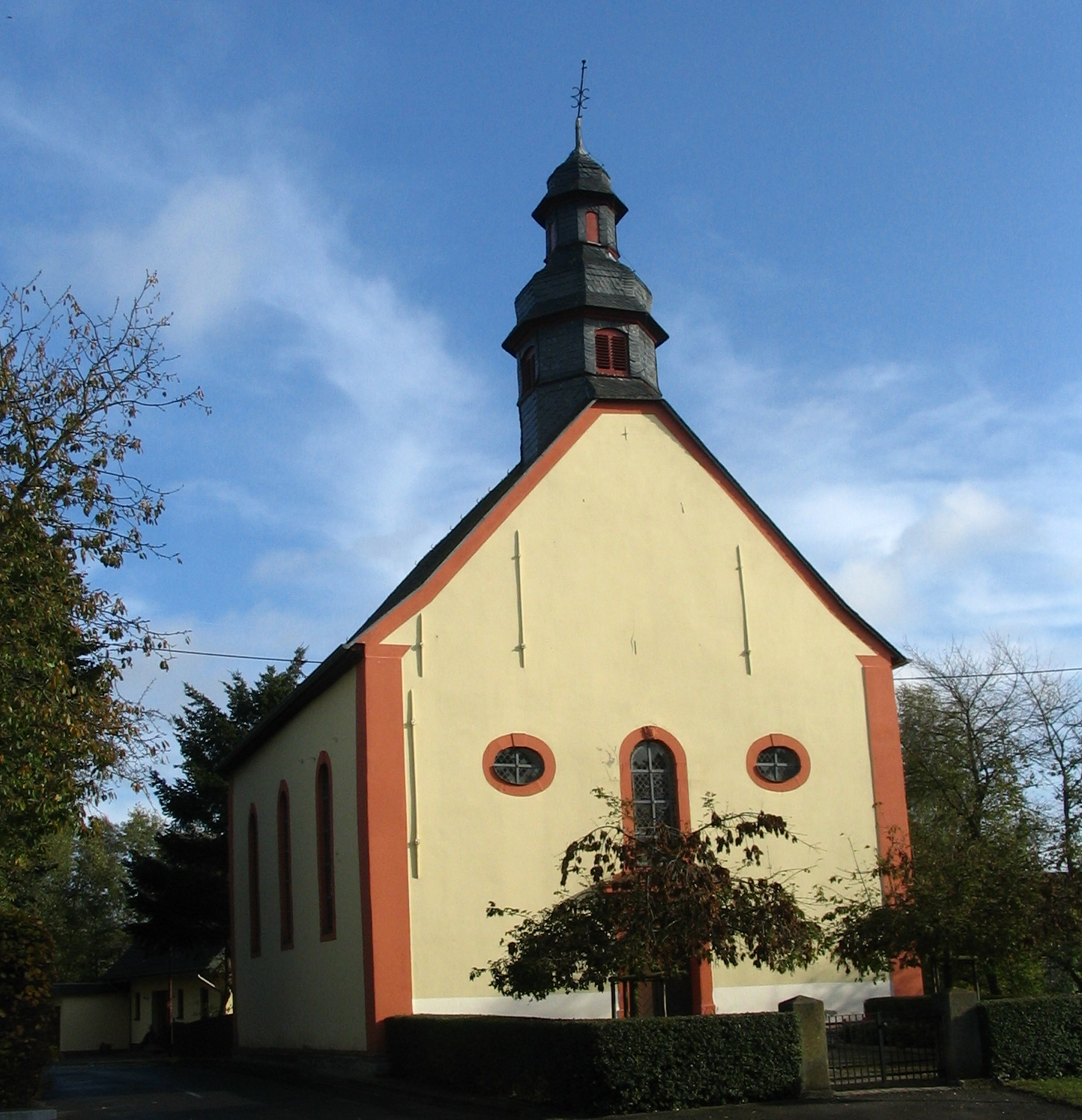 Kirche Pleizenhausen